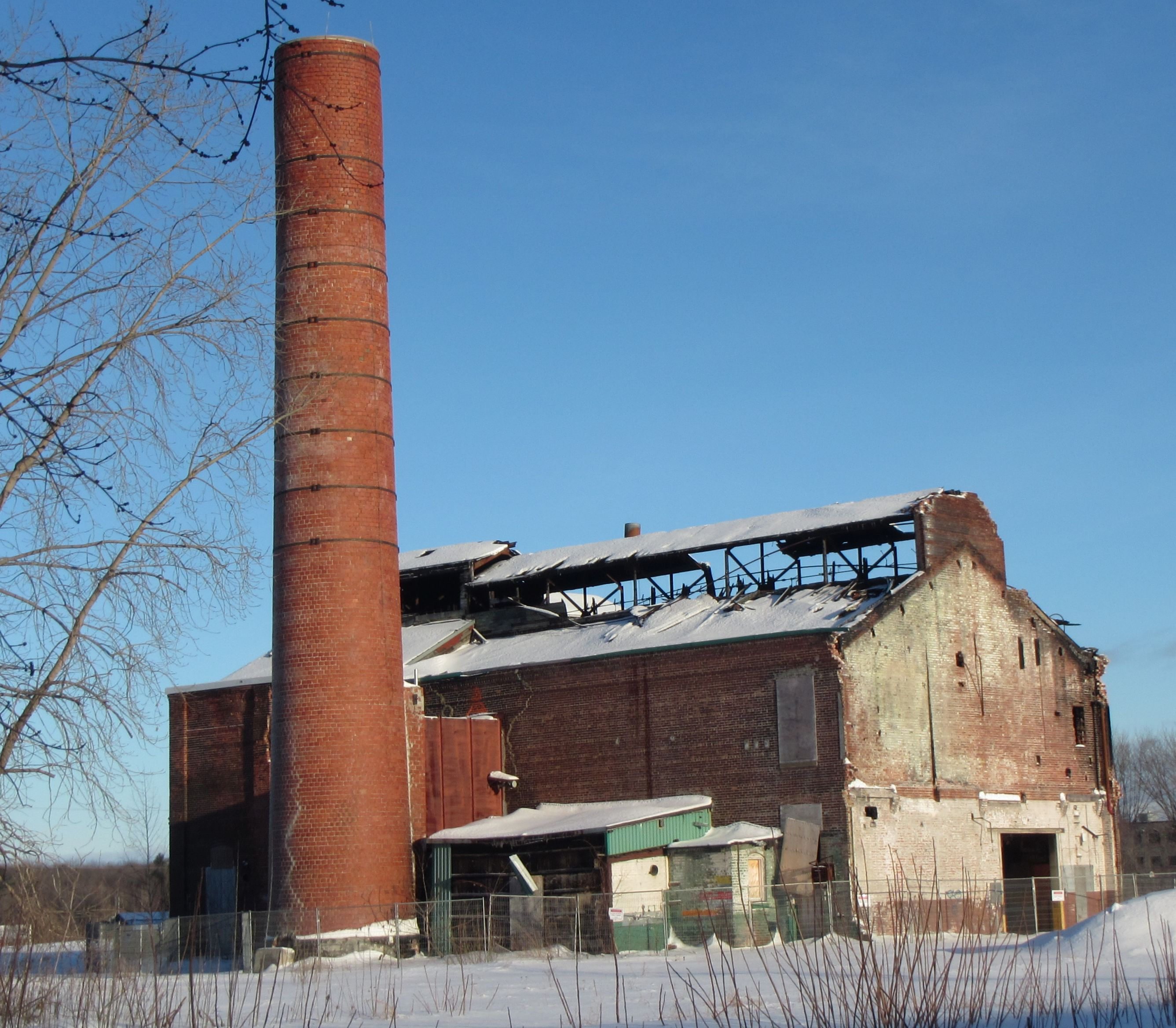 Manufacture Dominion-Silk-Dyeing-and-Printing, au 416 rue Heriot à Drummondville, Québec.